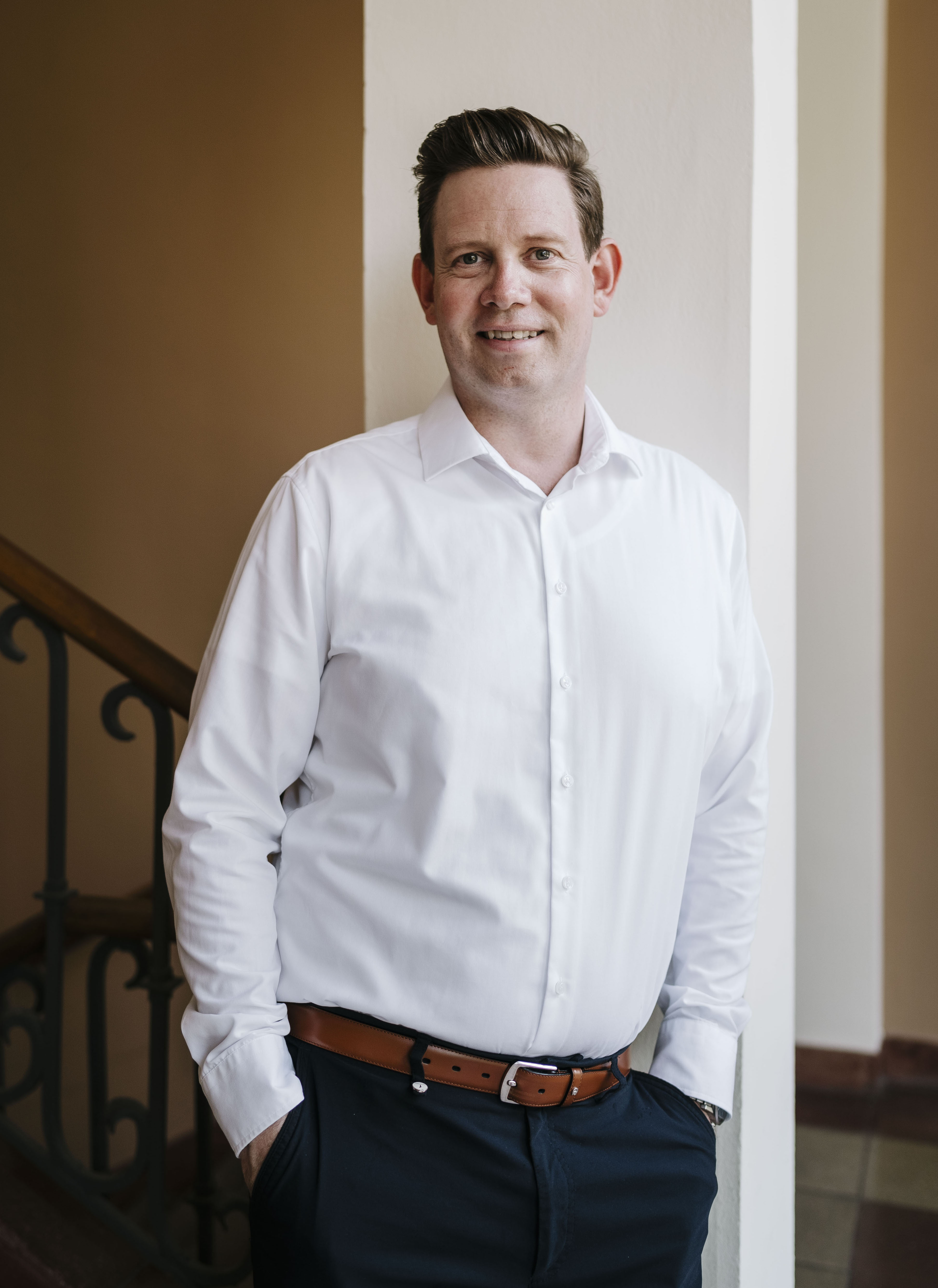 Prof. Dr. Jürgen Radel, im Jahr 2019, an der HTW Berlin, Treskowallee 8